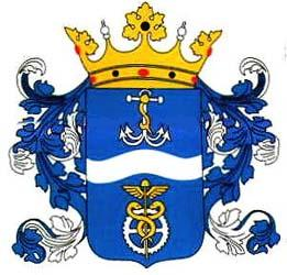 coat Budapest 20 district